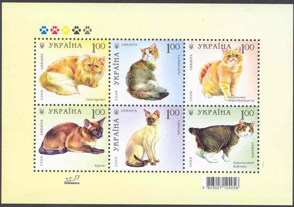 Блок марок України «Коти»